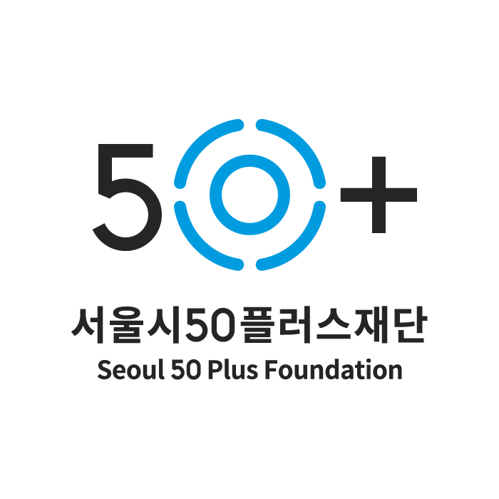 서울시50플러스재단 로고